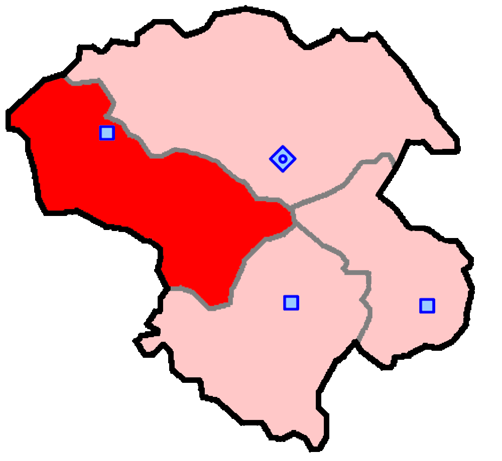 حوزهٔ انتخاباتی ماهنشان و ایجرود و بوغداکندی و قلتوق برای انتخابات مجلس شورای اسلامی